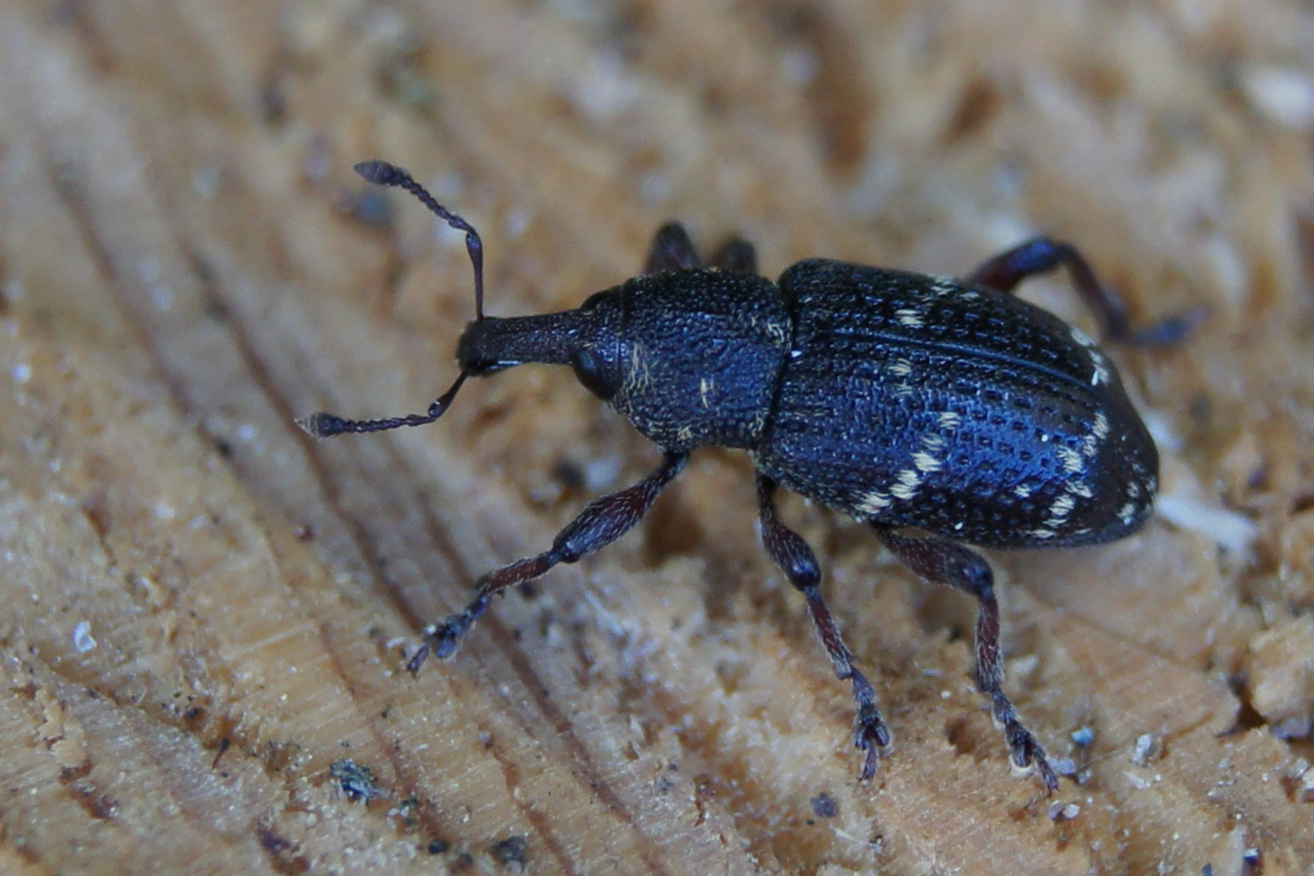 Mažasis pušinis straubliukas (Hylobius pinastri)